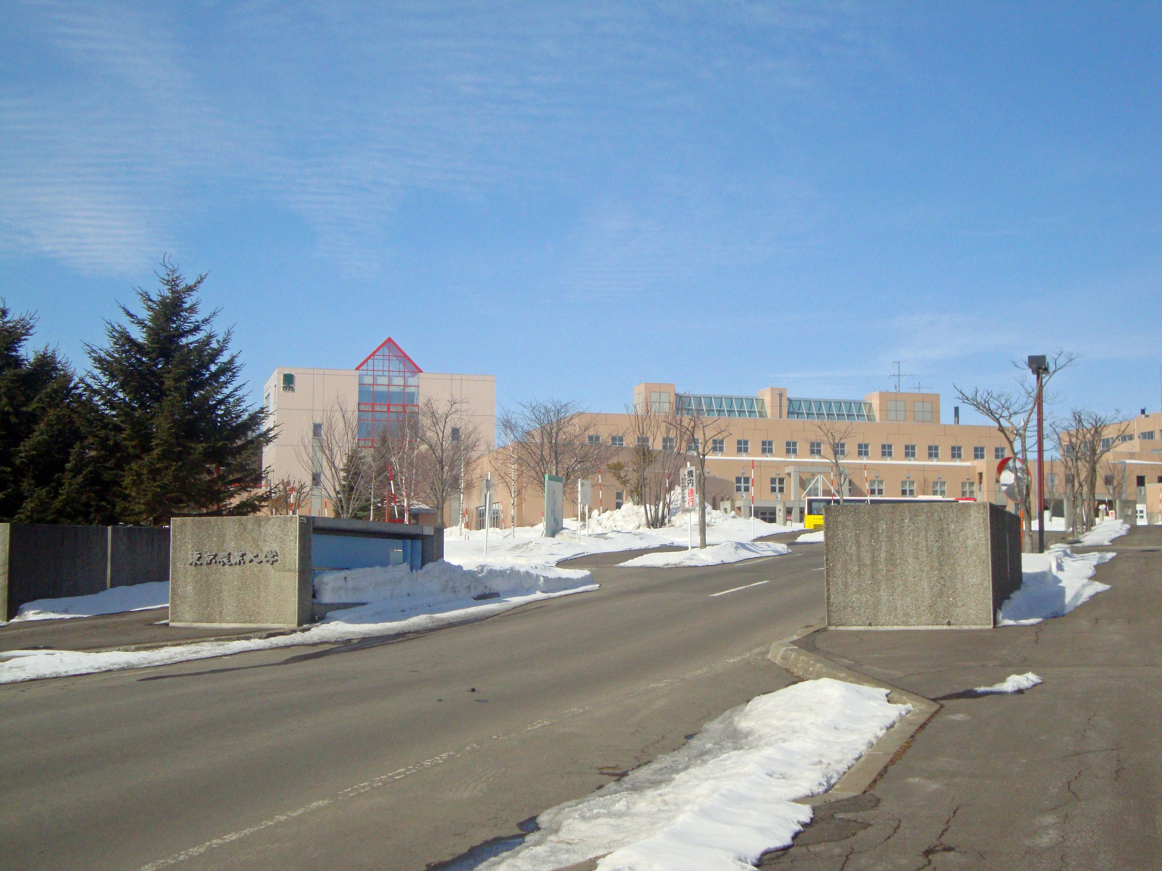 東京農業大学オホーツクキャンパス正門